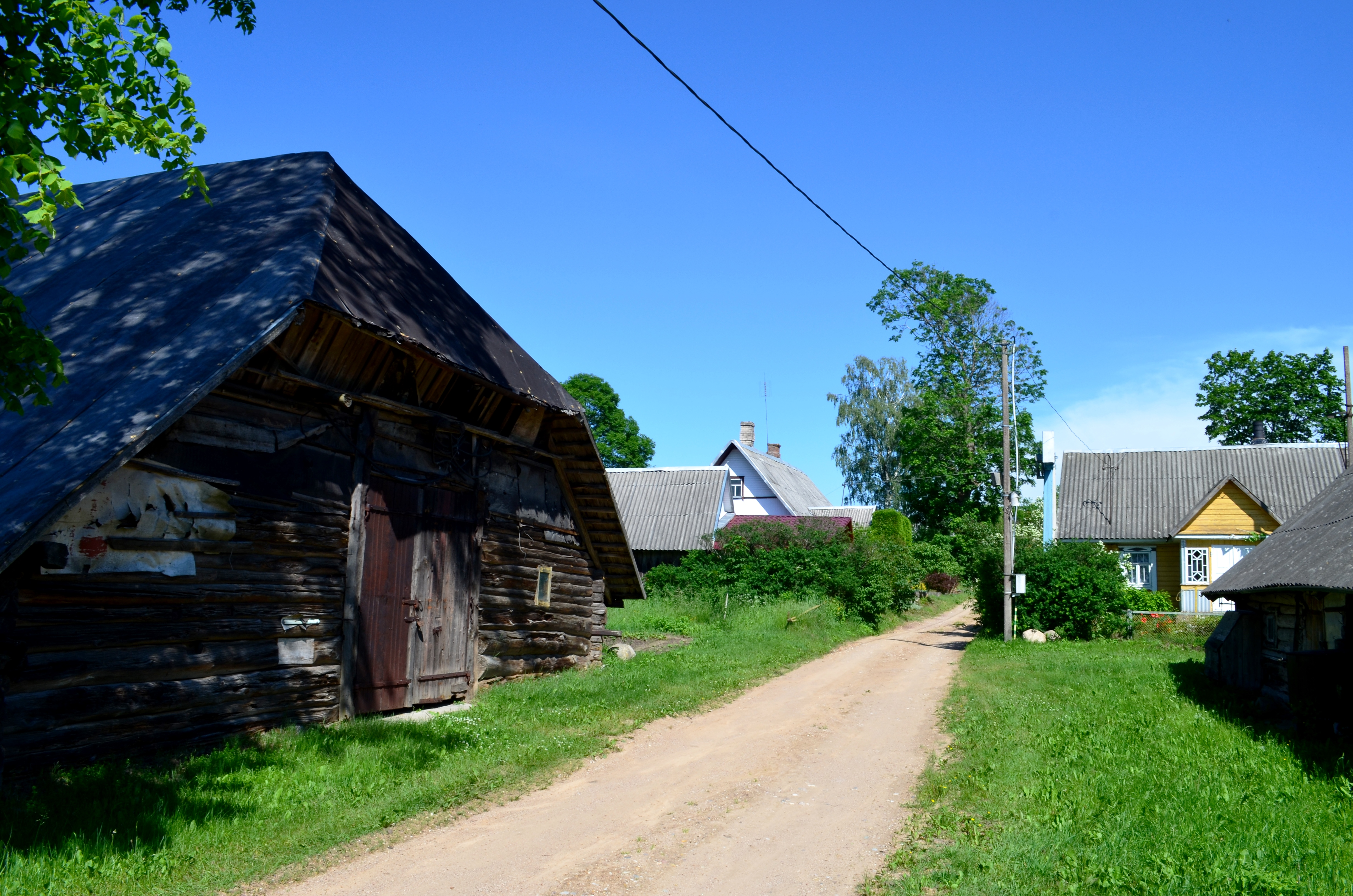 Karlos, Visagino sav.